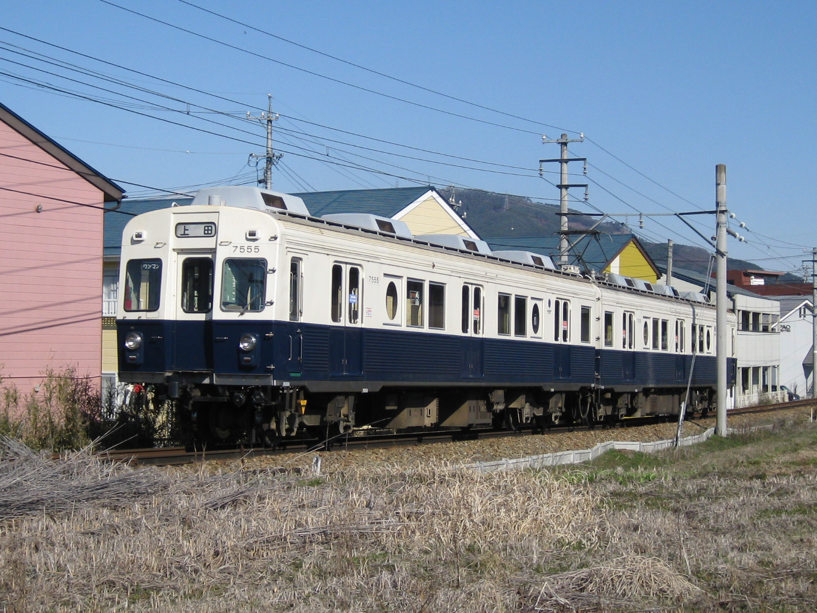 上田電鉄7255F